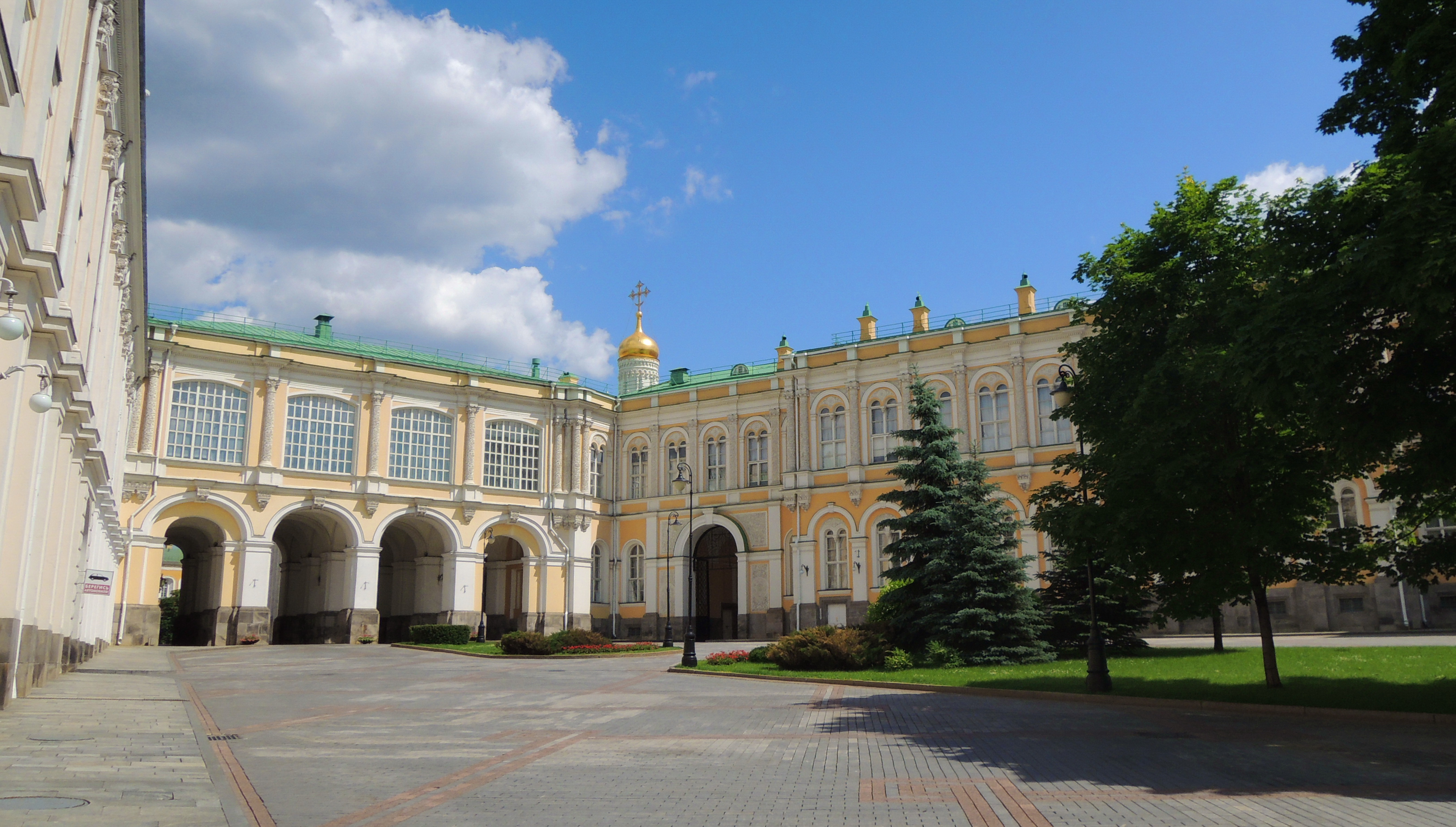 Дворцовая площадь (Кремль)